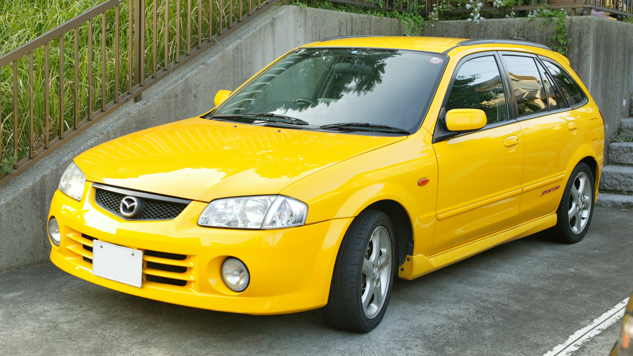 Mazda Familia S-Wagon SPORT 20